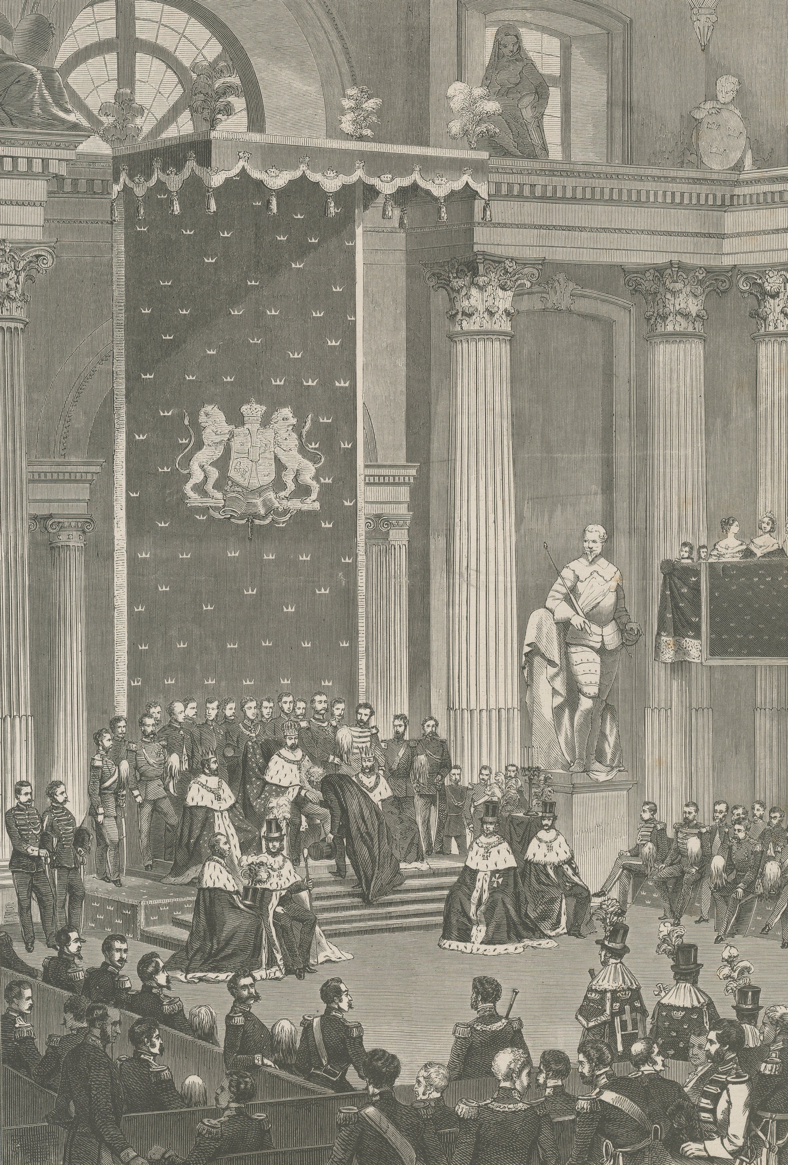 Karl XV avslutar den sista ståndsriksdagen i Rikssalen på Stockholms slott den 22 juni 1866.